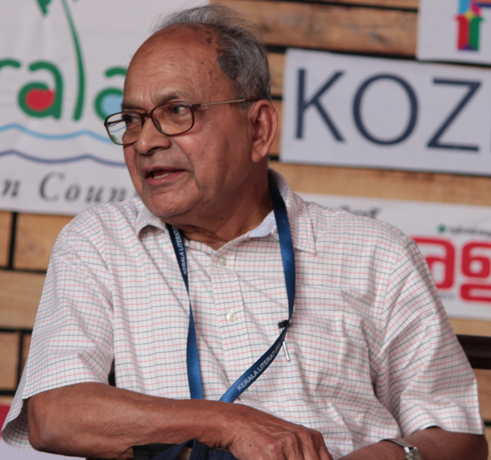 2017ല്‍ കോഴിക്കോട്